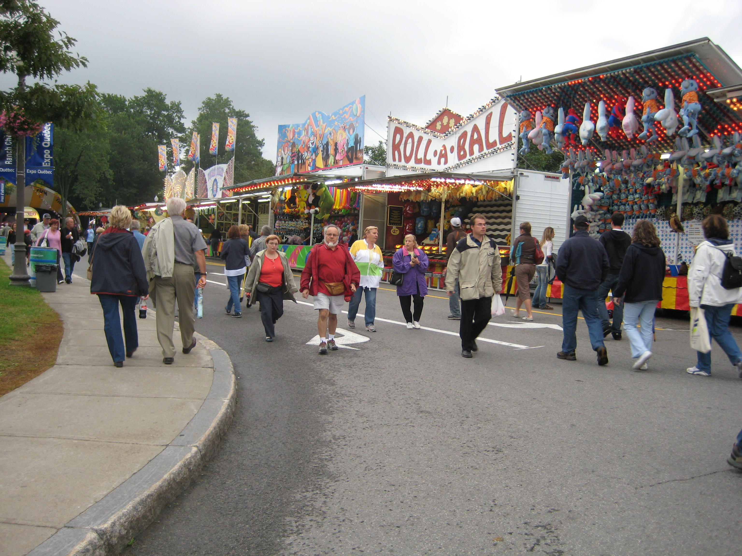 Jeux d'adresse lors de l'Expo Québec, à Québec.